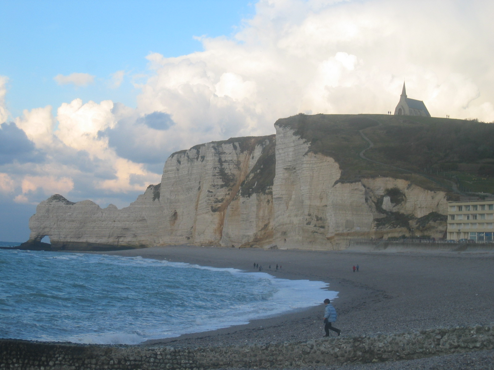 Falaise bei Étretat